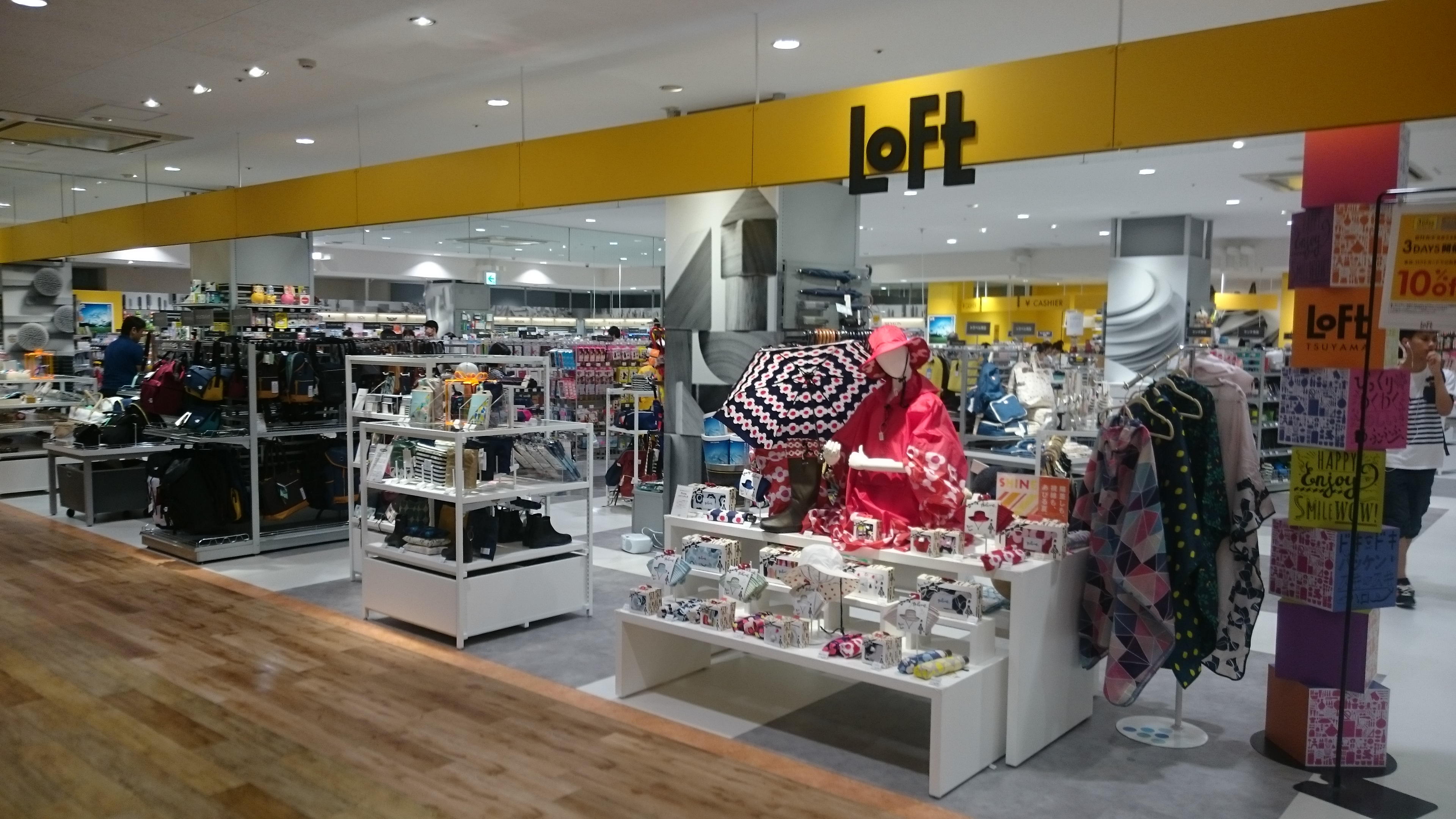 アルネ津山2階の「津山ロフト」です